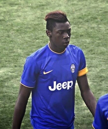 Accademia del Calcio "Adolfo De Cecco" a Poggio degli Ulivi, Città Sant'Angelo (PE). Il calciatore italiano Moise Bioty Kean in azione nelle giovanili della Juventus, nel corso della vittoriosa sfida contro il Monteruscello (5-0) valevole per la Nike Premier Cup 2015.